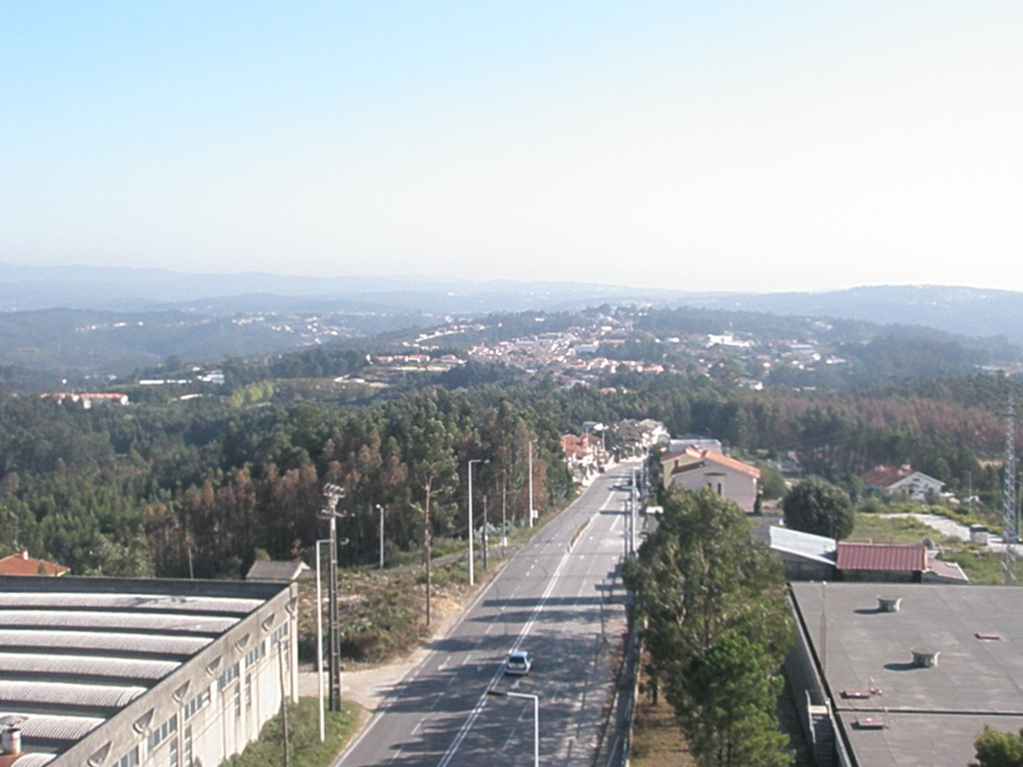 Jovim